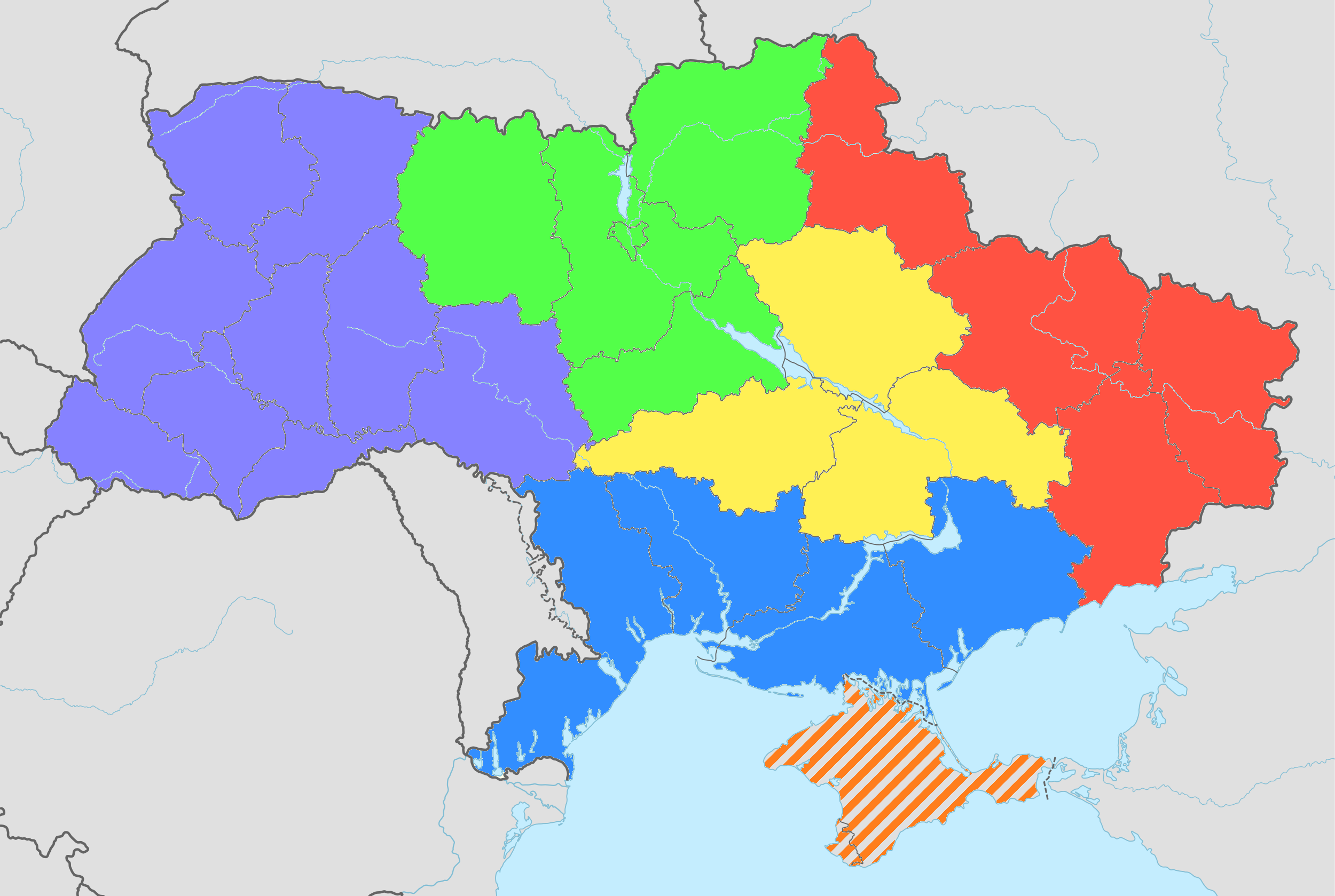 Карта, Національна гвардія України, Всі територіальні управління